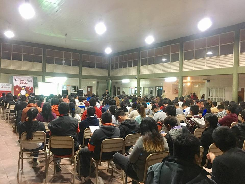 FLISoL 2017 Sede Itinerante en la localidad rural de Las Costas - Salta - Argentina.